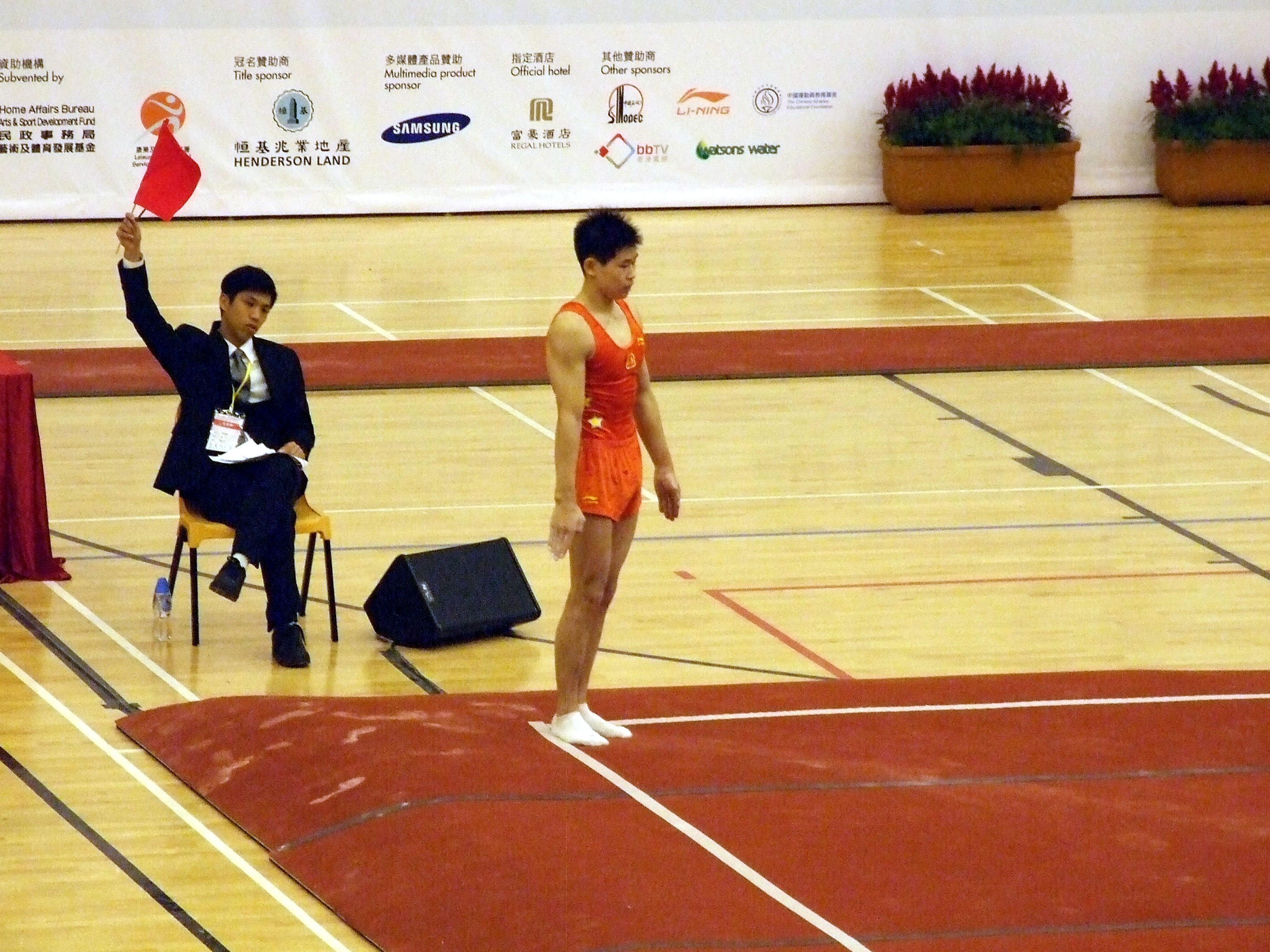 中文（香港）: 恒基兆業盃2011年全國體操冠軍賽自由體操邊線裁判